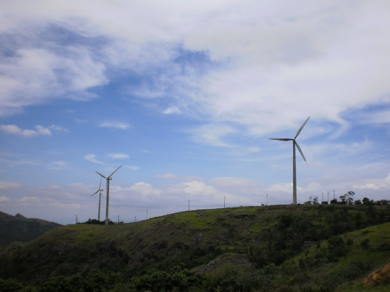 Nedumkandam കാറ്റാടിപ്പാടങ്ങള്‍